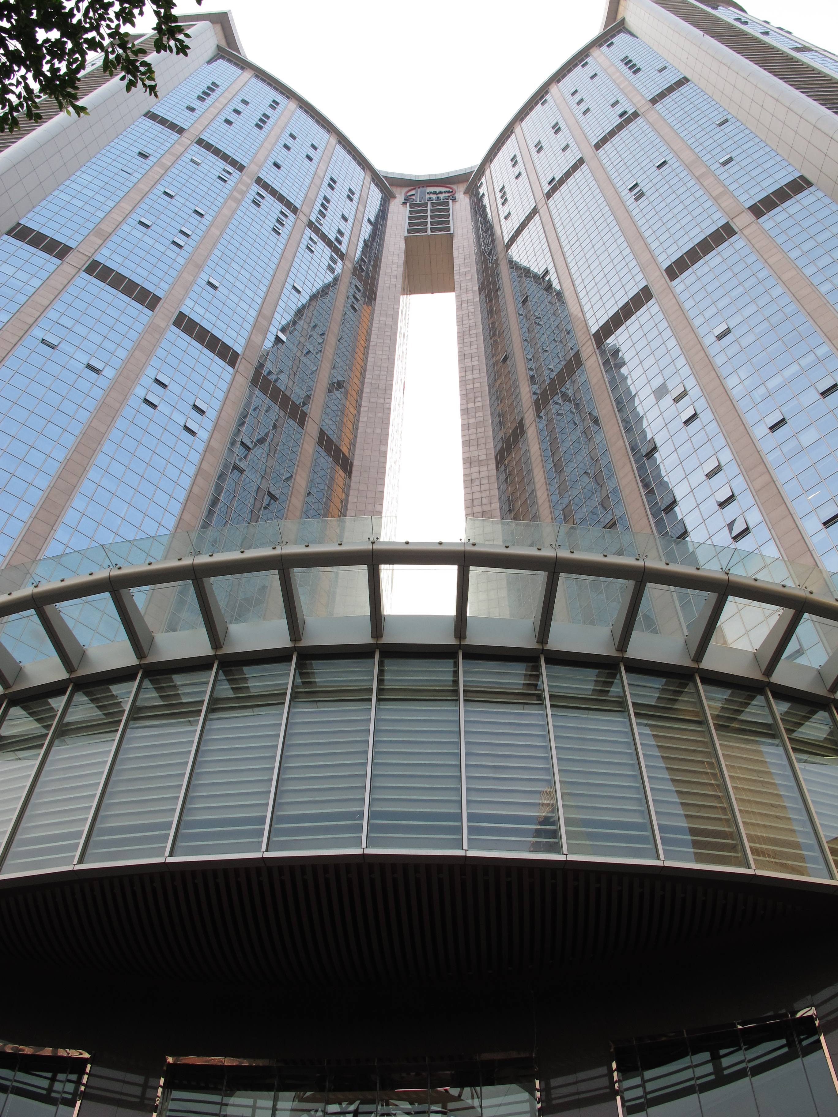 中石化大樓 Sinopec Building